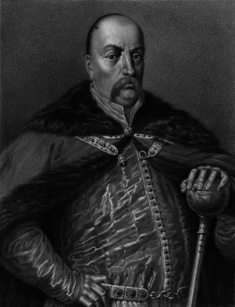 Беларуская (тарашкевіца): Партрэт Януша Радзівіла аўтарства Войцеха Герсона